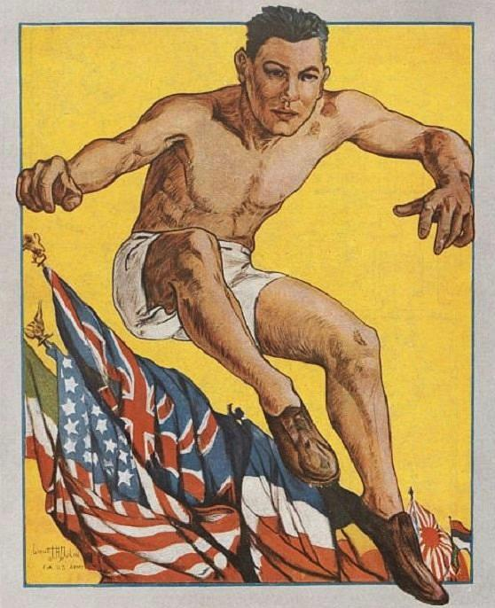 Affiche des Jeux Interalliés de 1919.